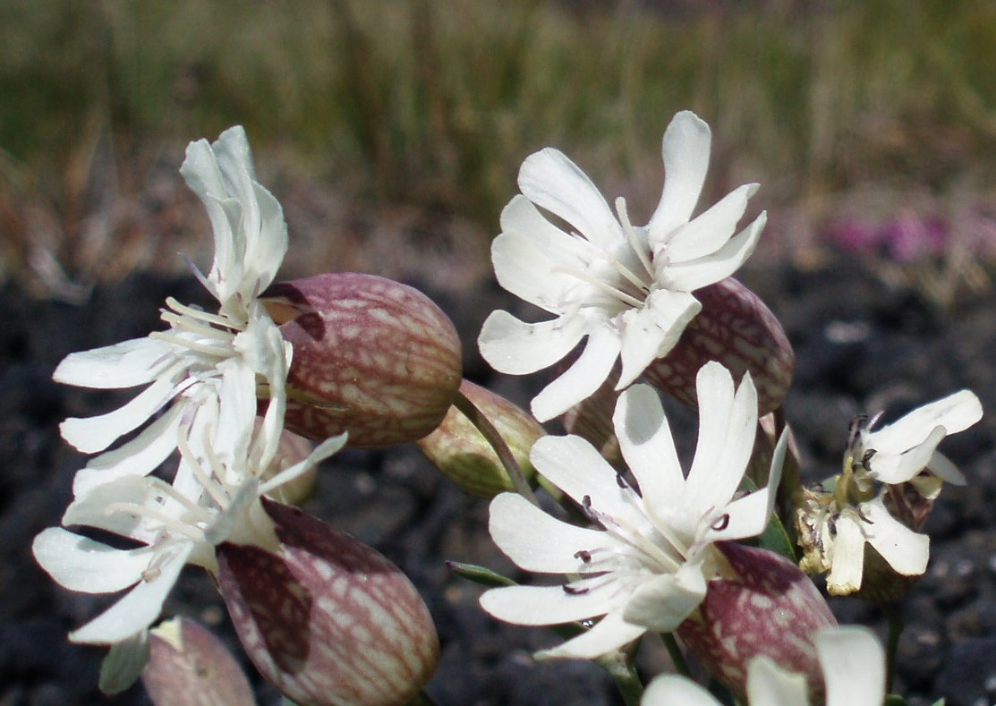 Silene uniflora (Klippen-Leimkraut) in Iceland